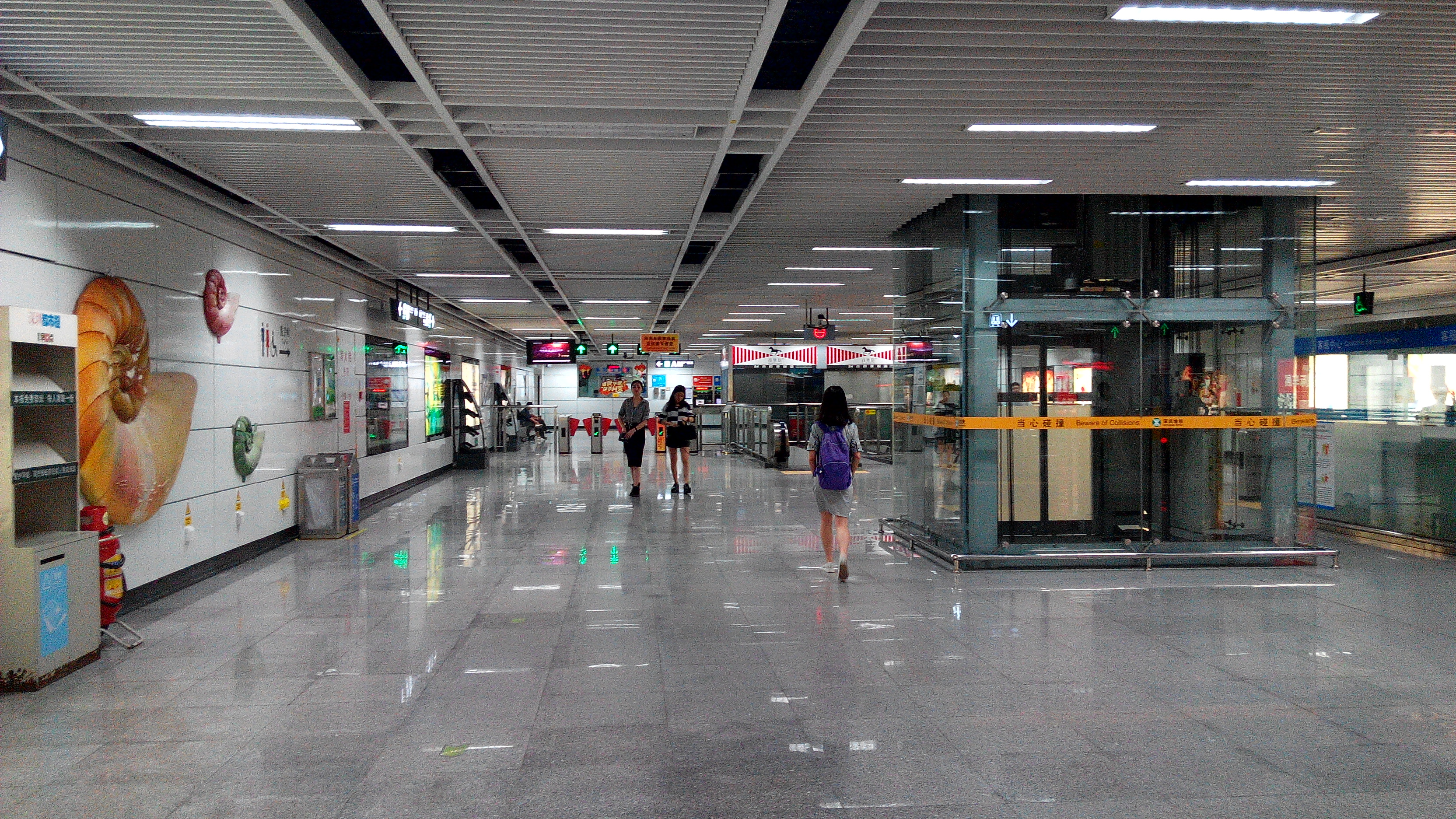 深圳地铁三号线 水贝站大堂